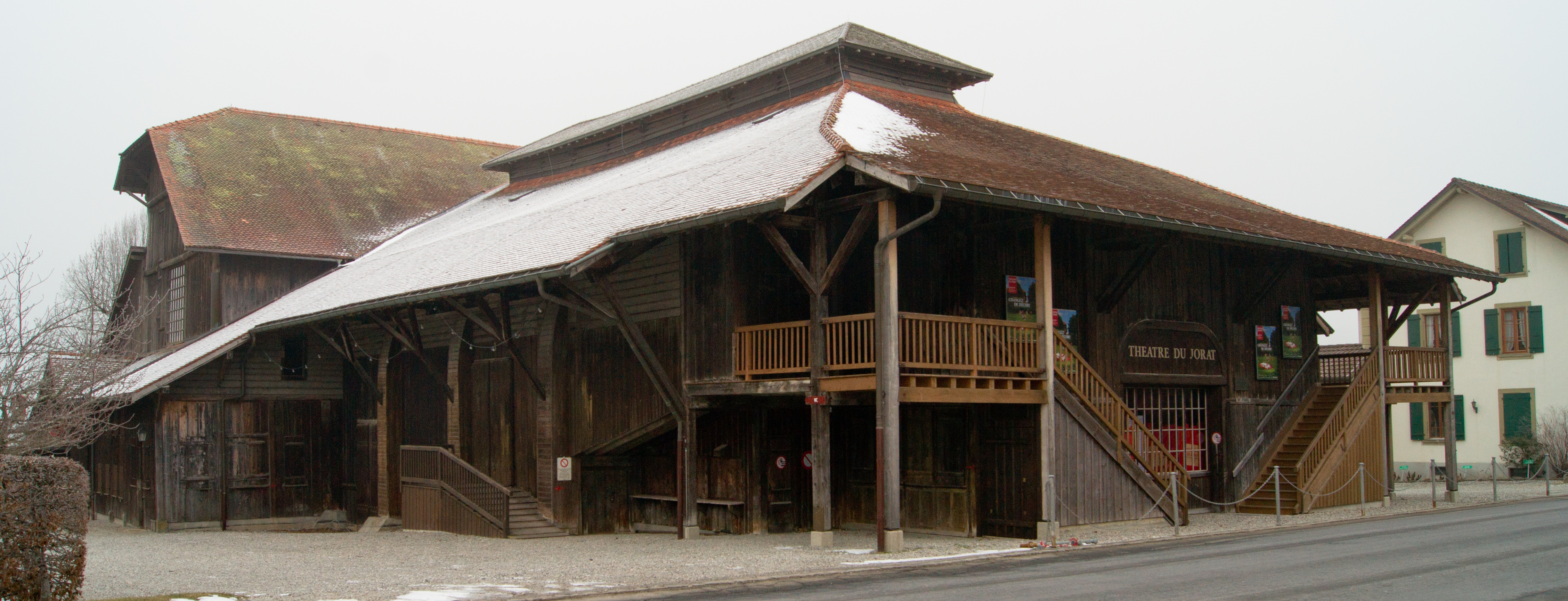 Thêatre du Jorat - Mézières.